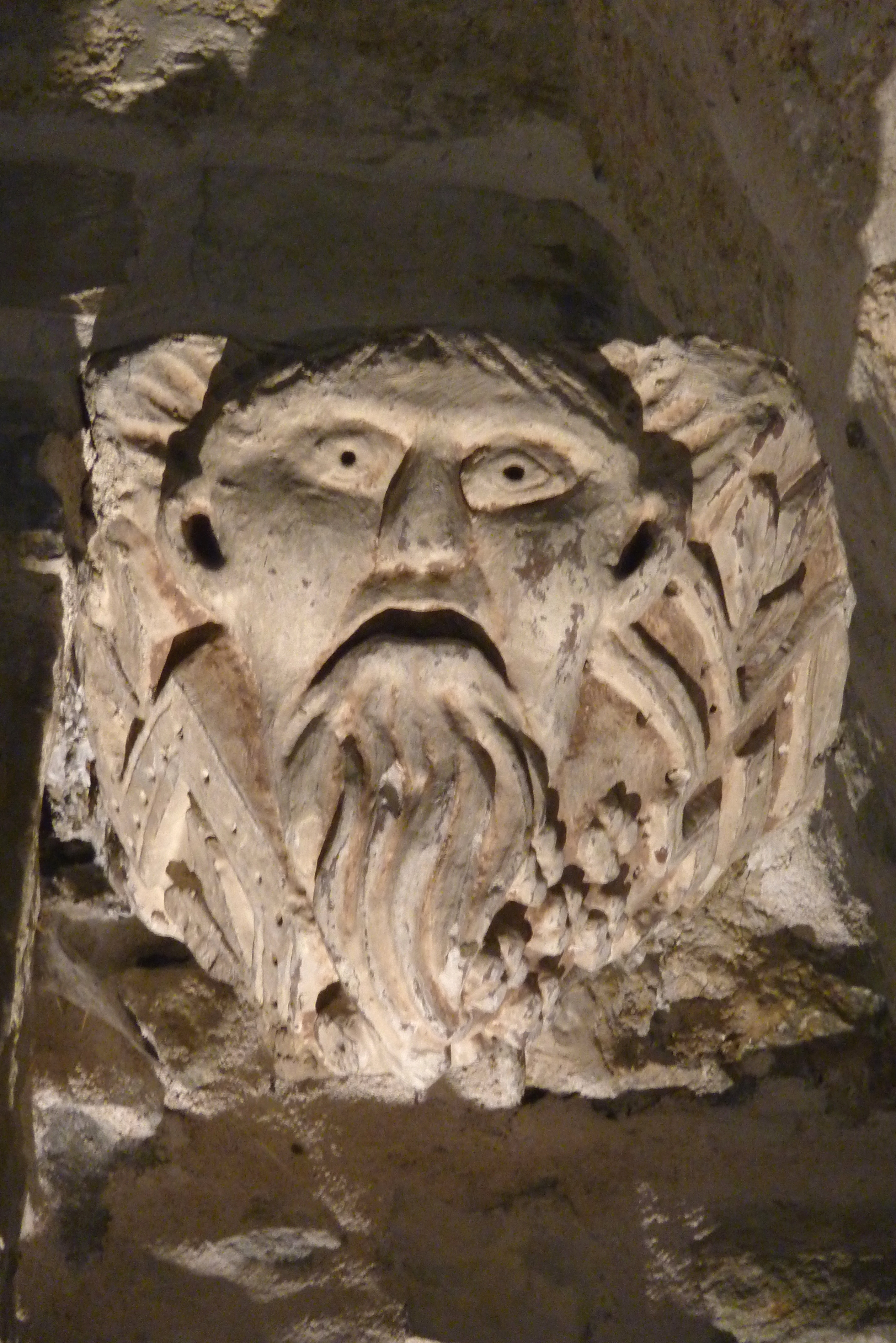 romanische Kirche Notre-Dame in Piégros-la-Clastre